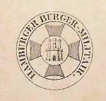 Wappen des Hamburger Bürgermilitärs 1814-1868